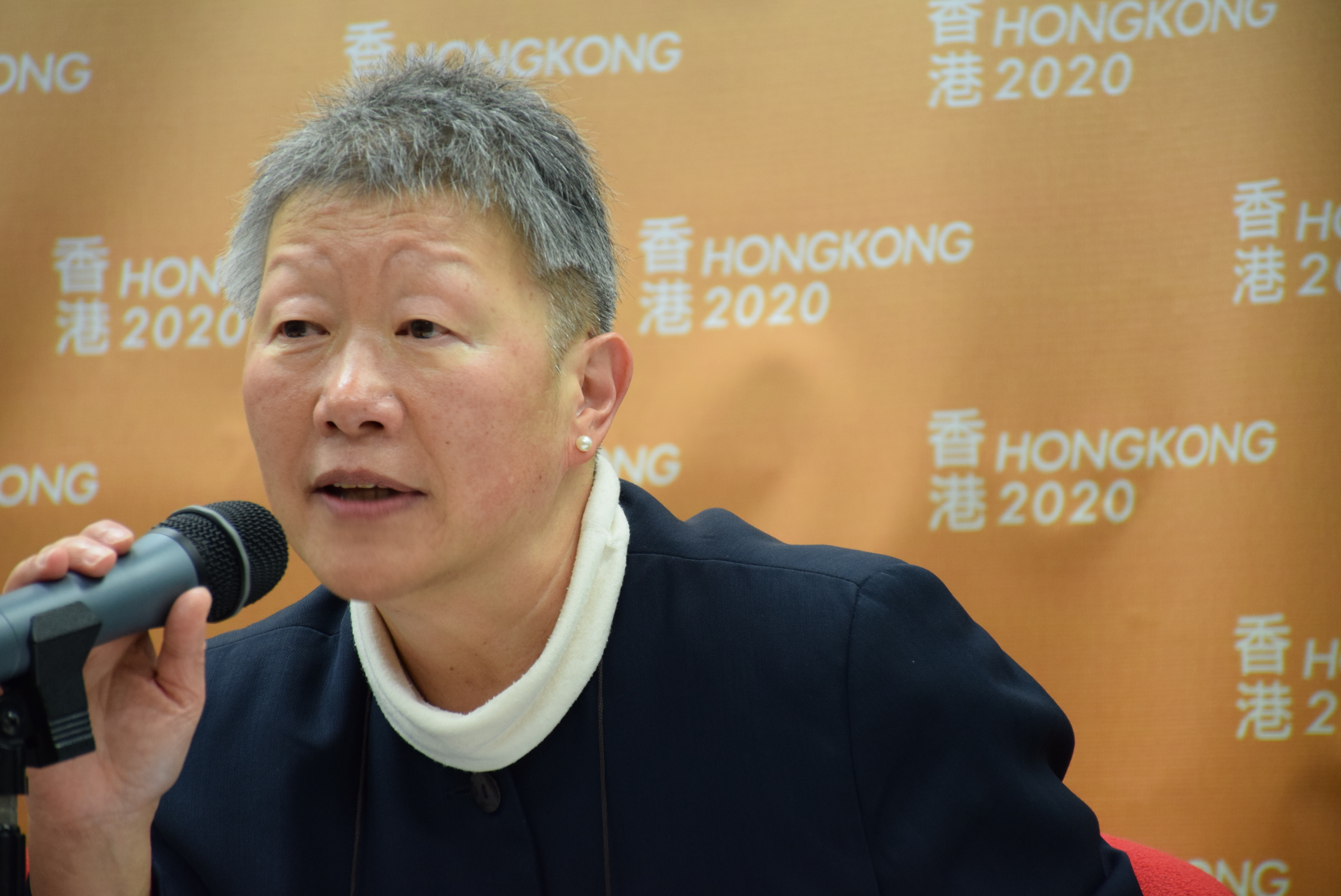 Gladys Li